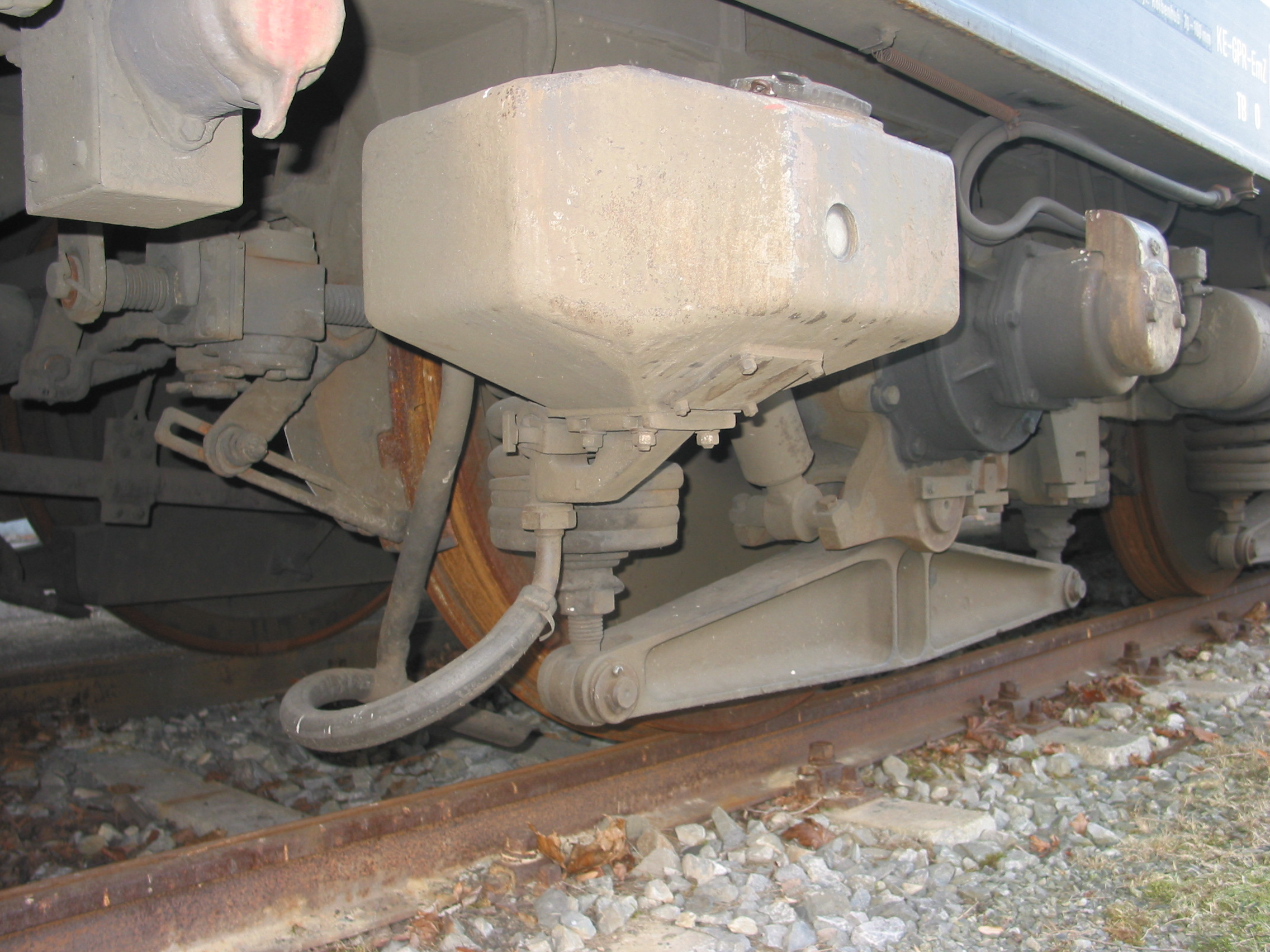 Sandungsvorrichtung einer elektrischen Lokomotive der Baureihe 103 der Deutschen Bahn AG